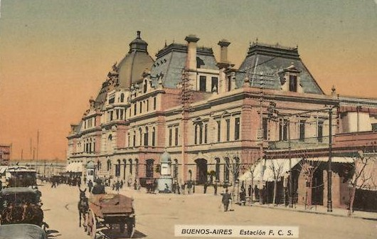 Vista de la estación Constitución hacia 1910, antes de la construcción del nuevo hall y la fachada sobre la calle Hornos.